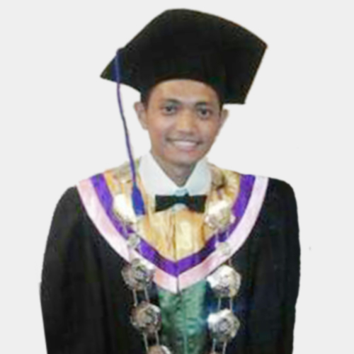 Muh Fitrah Yunus ketika dilantik menjadi Wakil Ketua STIE Muhammadiyah Cilacap